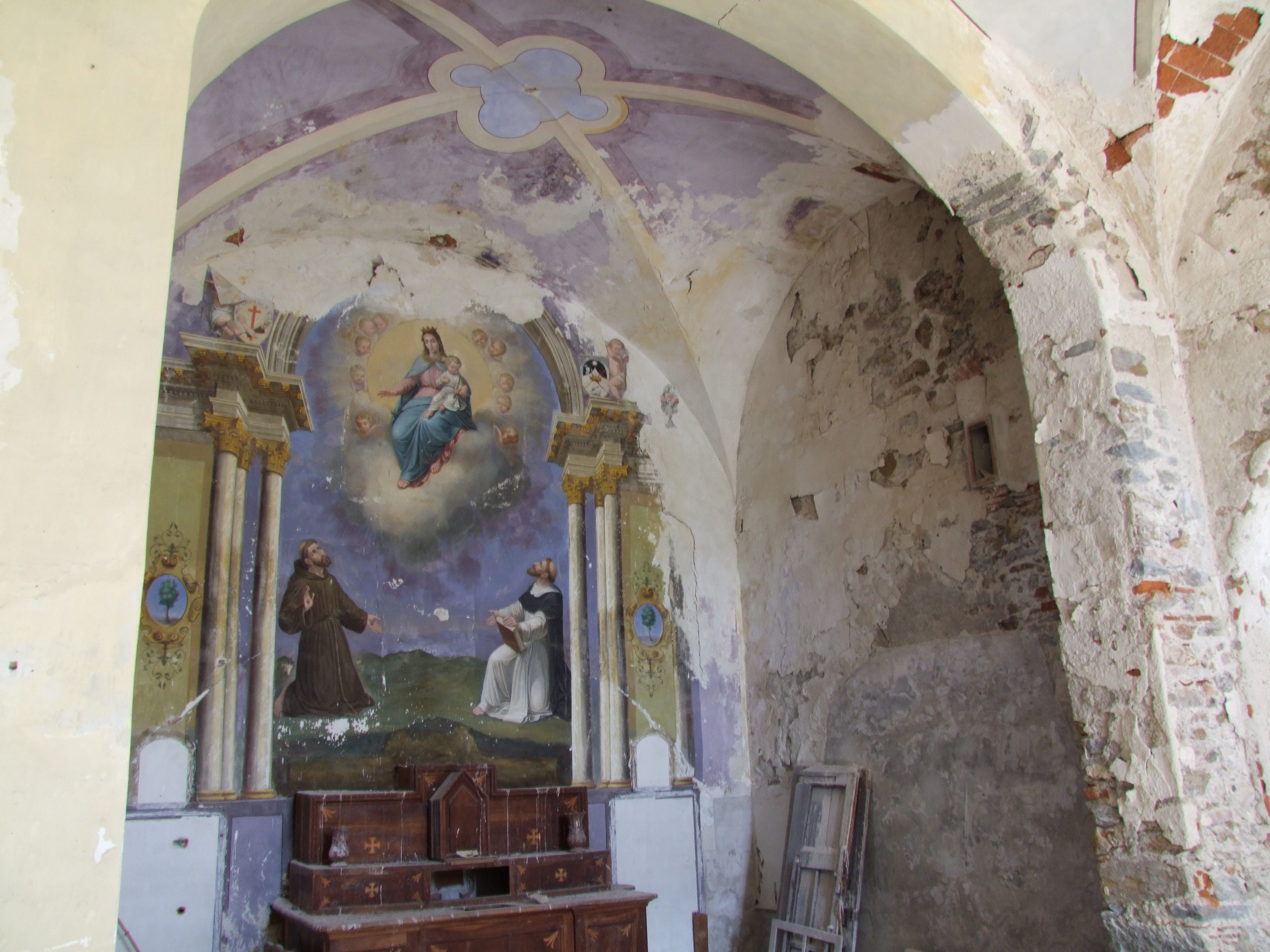 Vue générale vers l'angle est-sud.